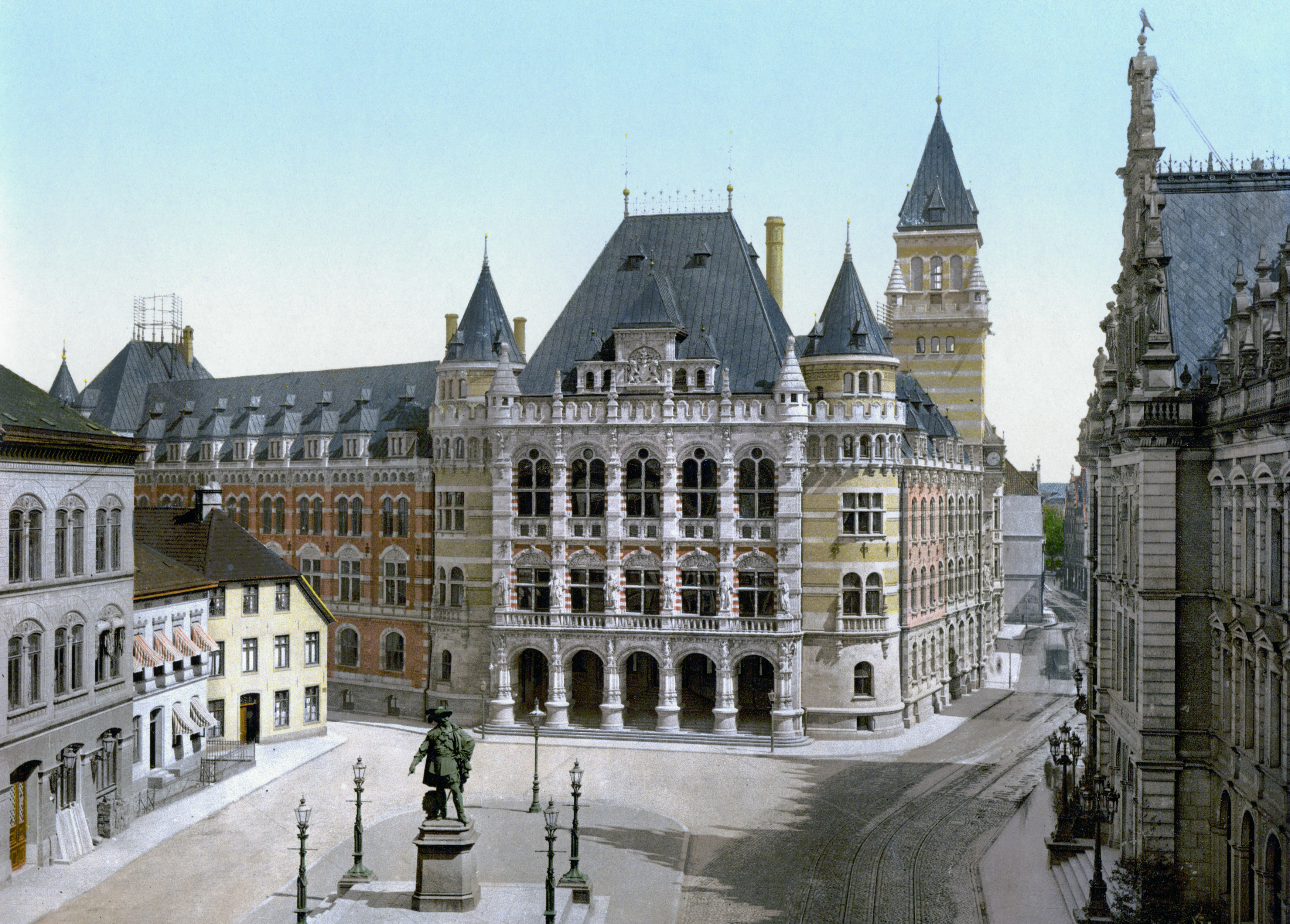 Gerichtsgebäude Bremen vor 1900 (die Straßenbahn wurde am 24. Mai 1900 elektrifiziert, die Aufnahme ist offensichtlich älter)